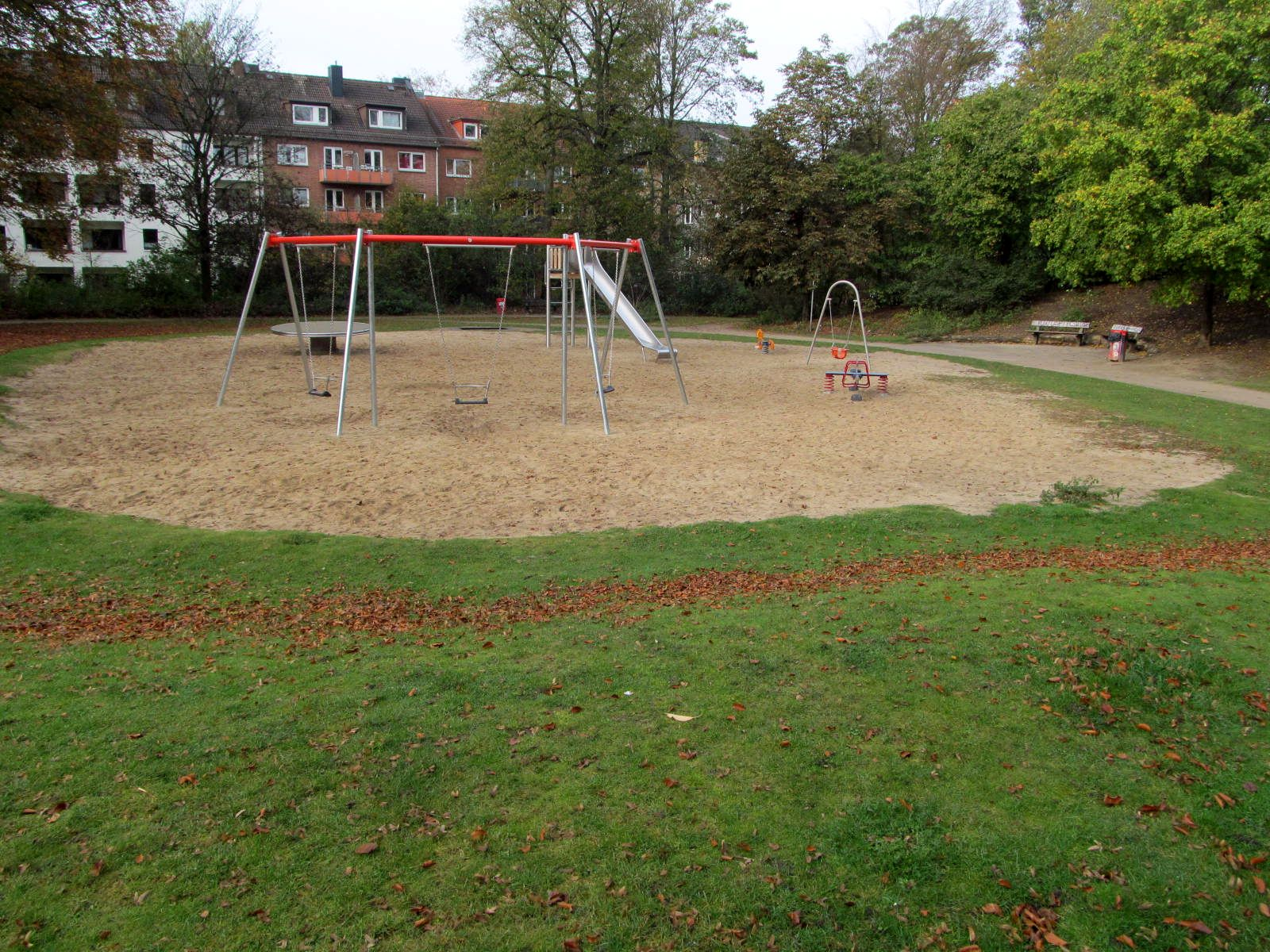 Eilbeker Bürgerpark, Spielplatz mit erneuerten Spielgeräten 2019